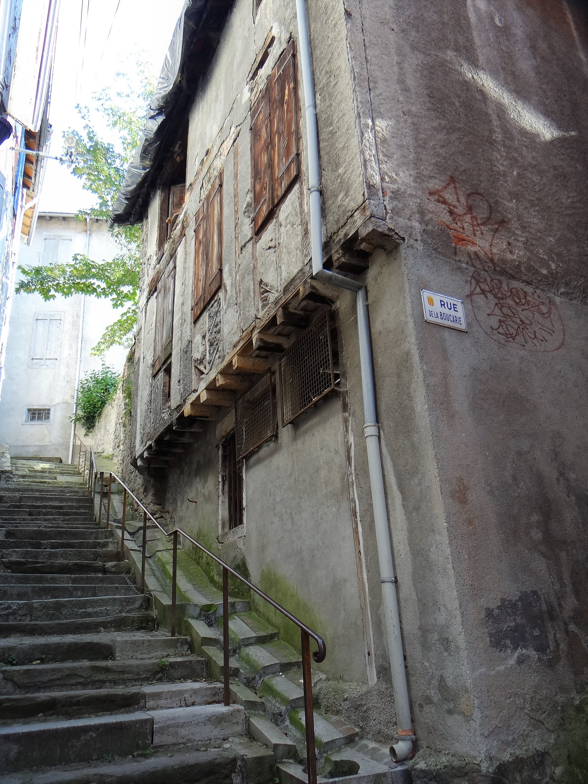 Ax-les-Thermes - Rue des escaliers